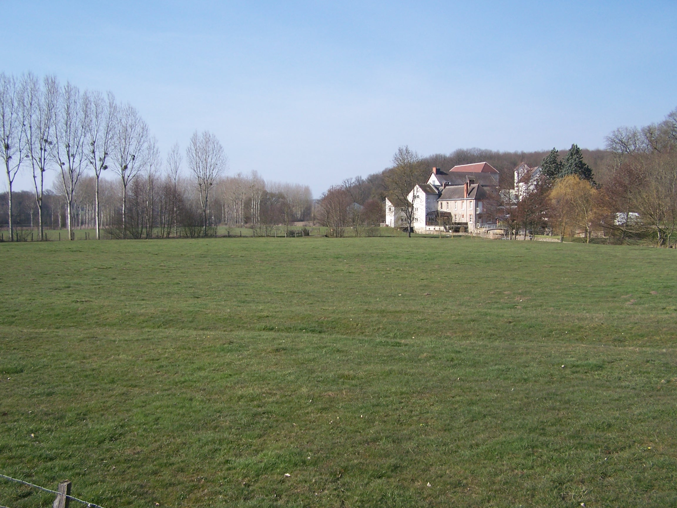 Vallée de la Brenne près de Villedômer, et le Moulin de Courquigny (commune d'Auzouer-en-Touraine)